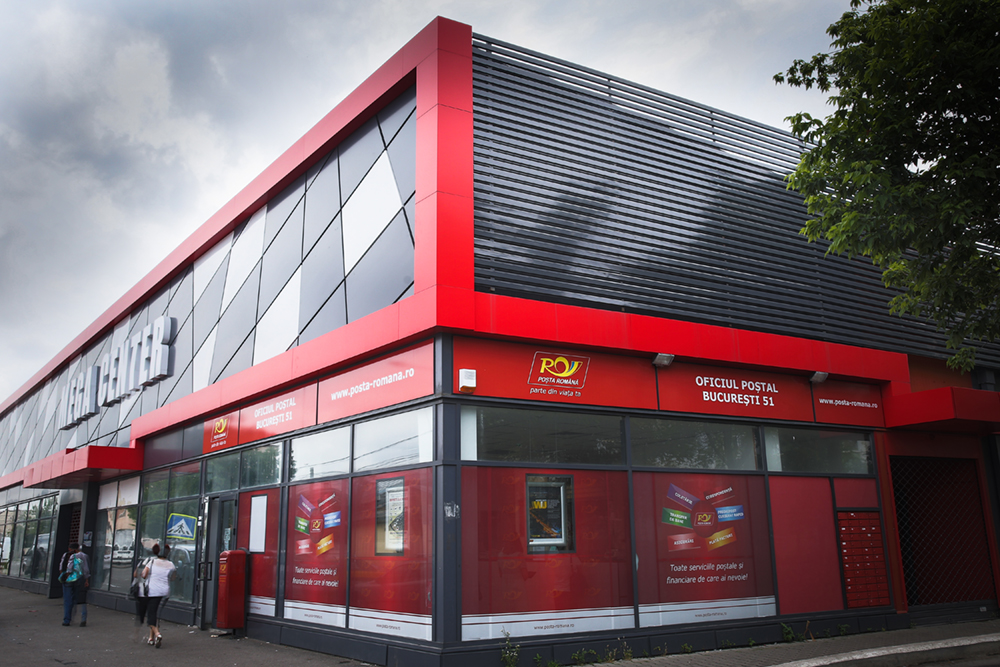 Exterior oficiul poştal 51, cartier Rahova, Bucureşti